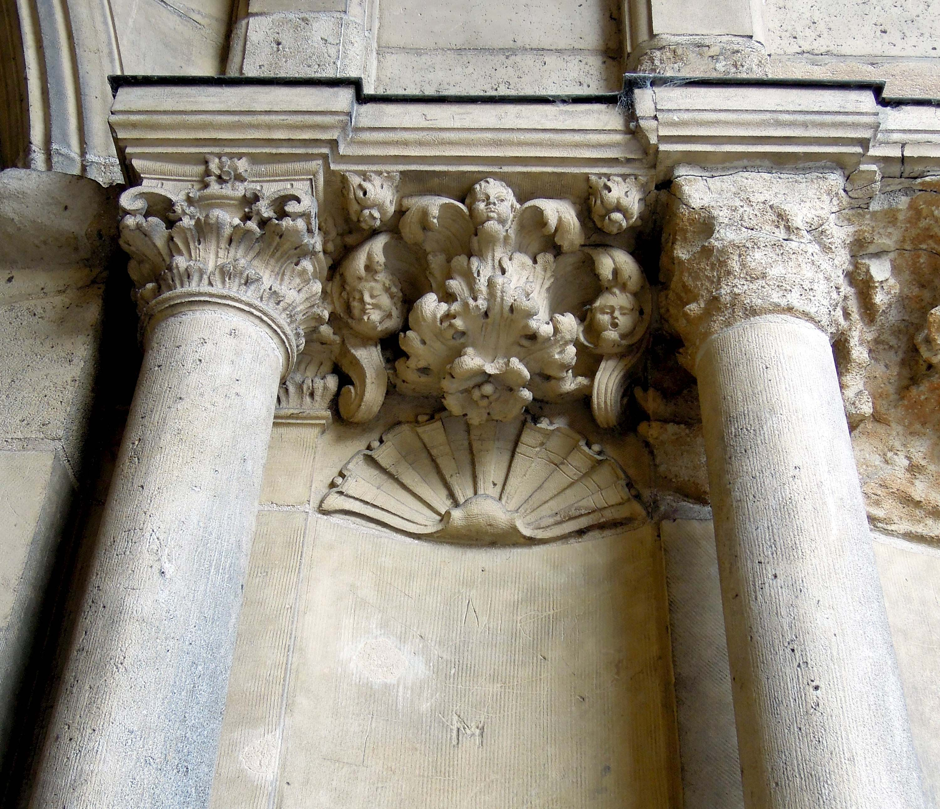 sous le Dôme Charlemagne d'Attigny Ardennes .